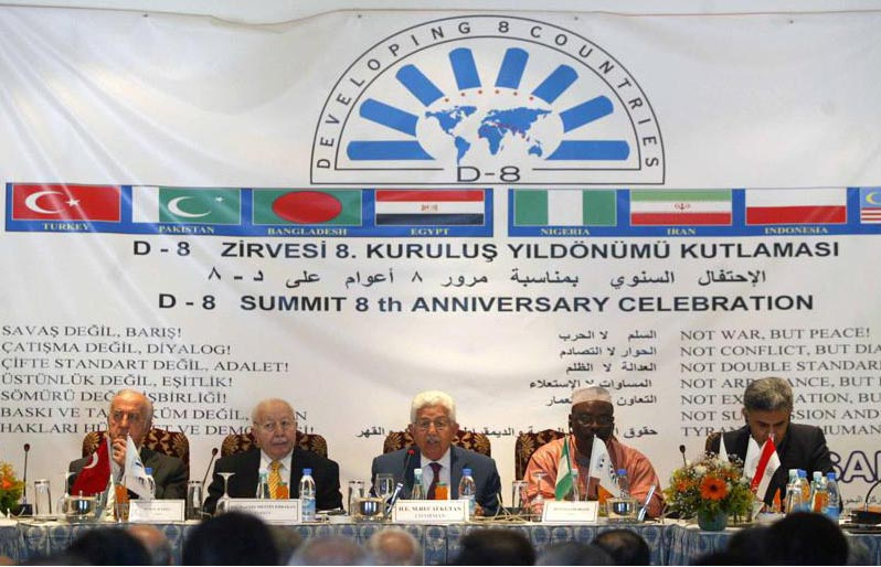 D-8 təşkilatının 8-ci quruluş ildönümü tədbiri.